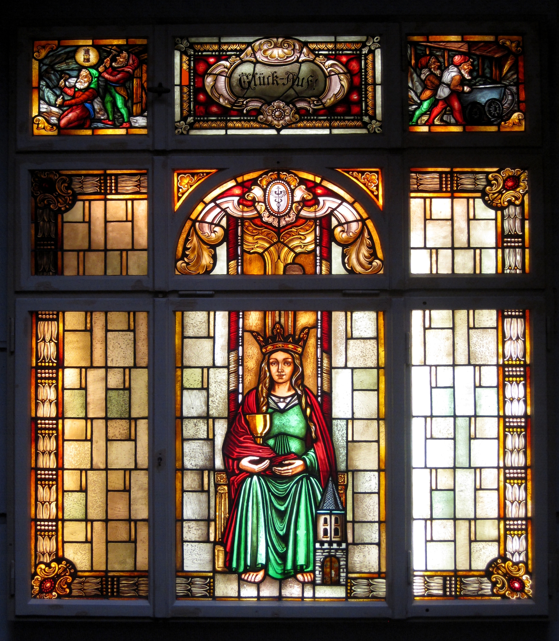 Deutsches Bergbau-Museum Bochum in Bochum. Glasfenster eines unbekannten Künstlers (um 1880) aus einem Wohnhaus in Essen. Dargestellt wird die Heilige Barbara als Schutzpratonin der Bergleute und eine Allegorie der Erzgewinnung und der Streckenförderung unter Tage durch Zwerge.